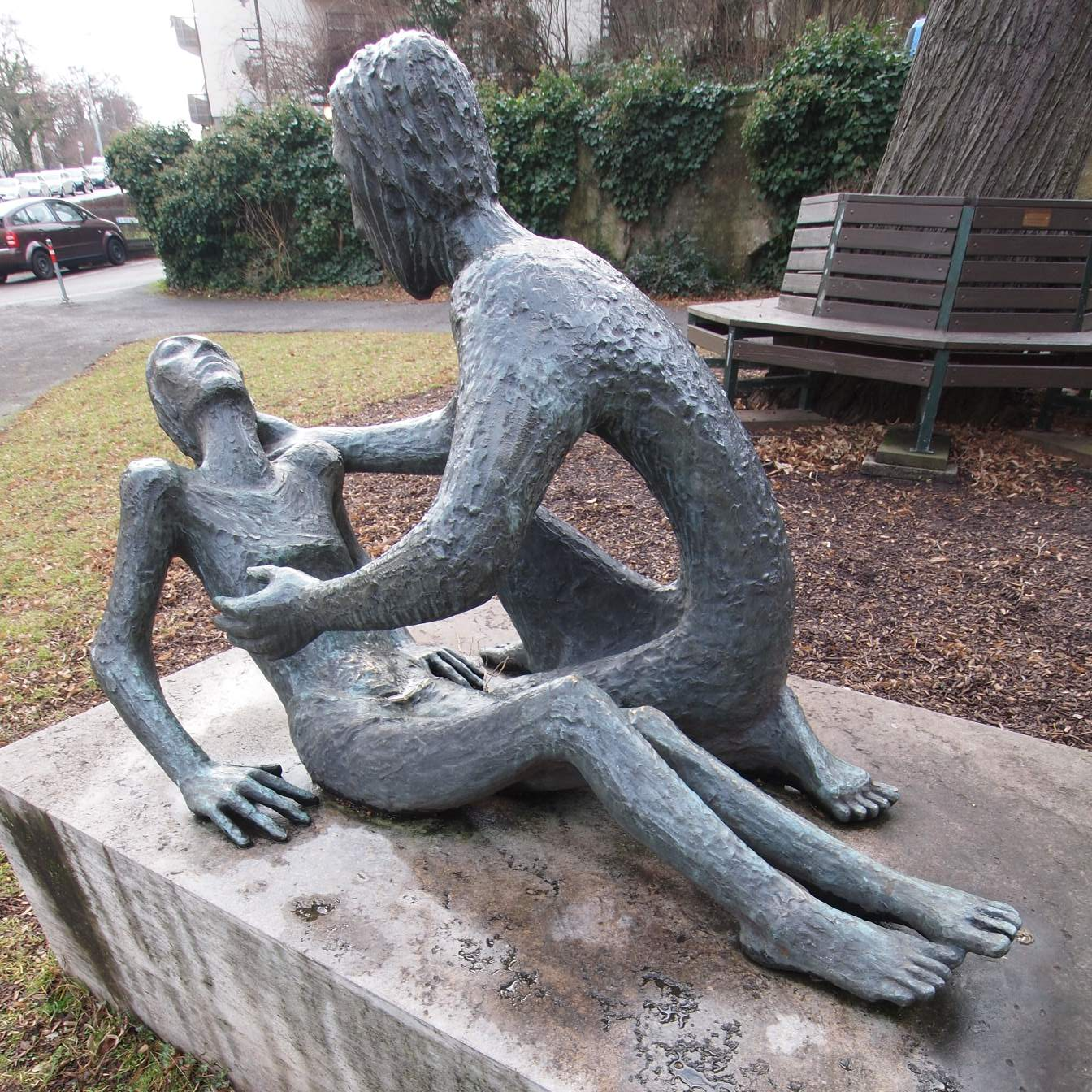 Skulptur „Der Barmherzige Samariter“ vor Erlöserkirche in Stuttgart